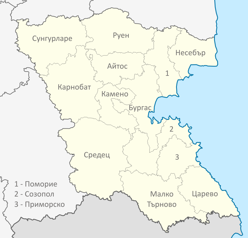 Картата е създадена от Любомир Таушанов